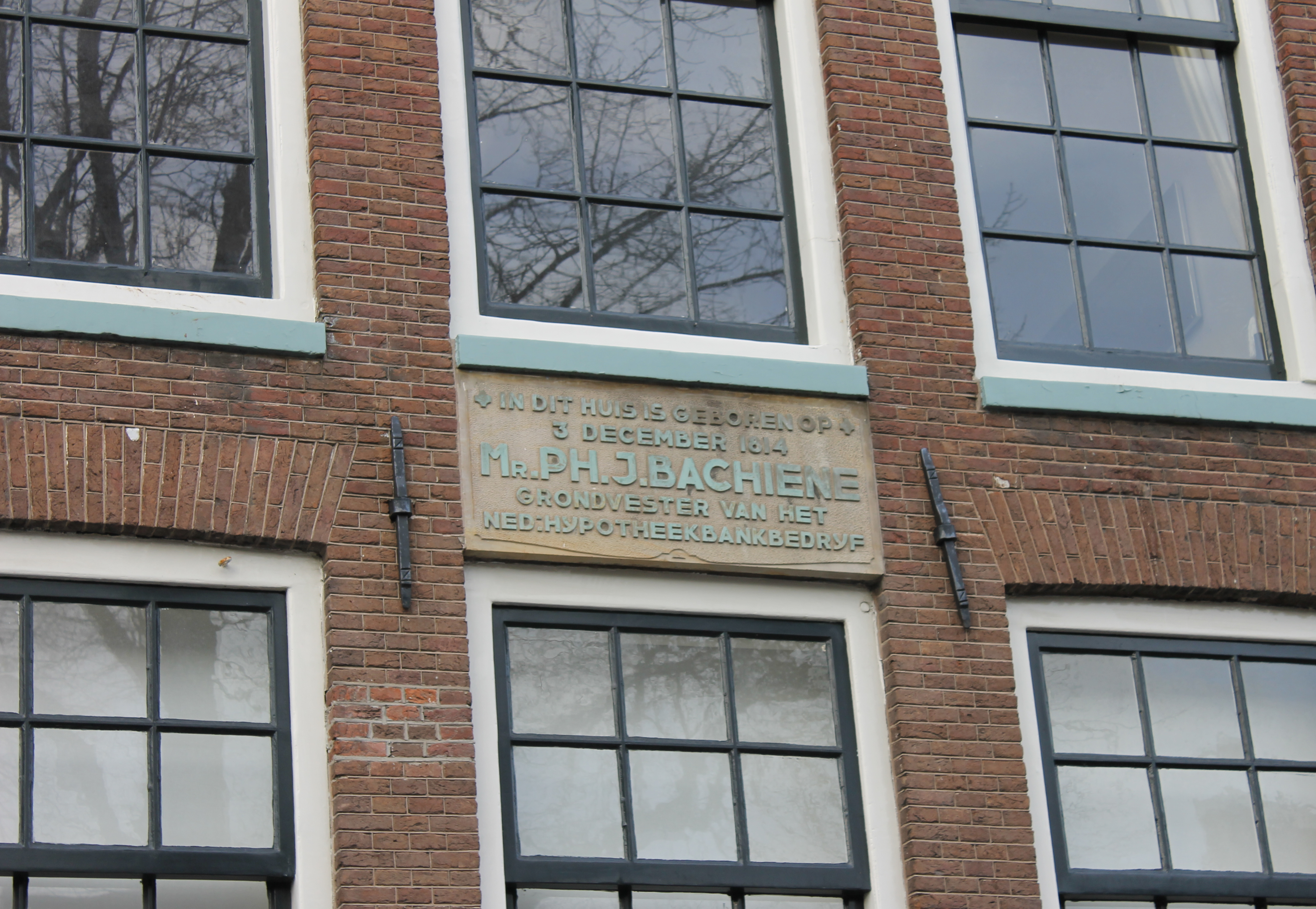 Plaquette in de gevel van Keizersgracht 703 te Amsterdam. De tekst luidt "In dit huis is geboren op 3 december 1814 mr. Ph.J. Bachiene grondvester van het Ned hypotheekbankbedrijf"